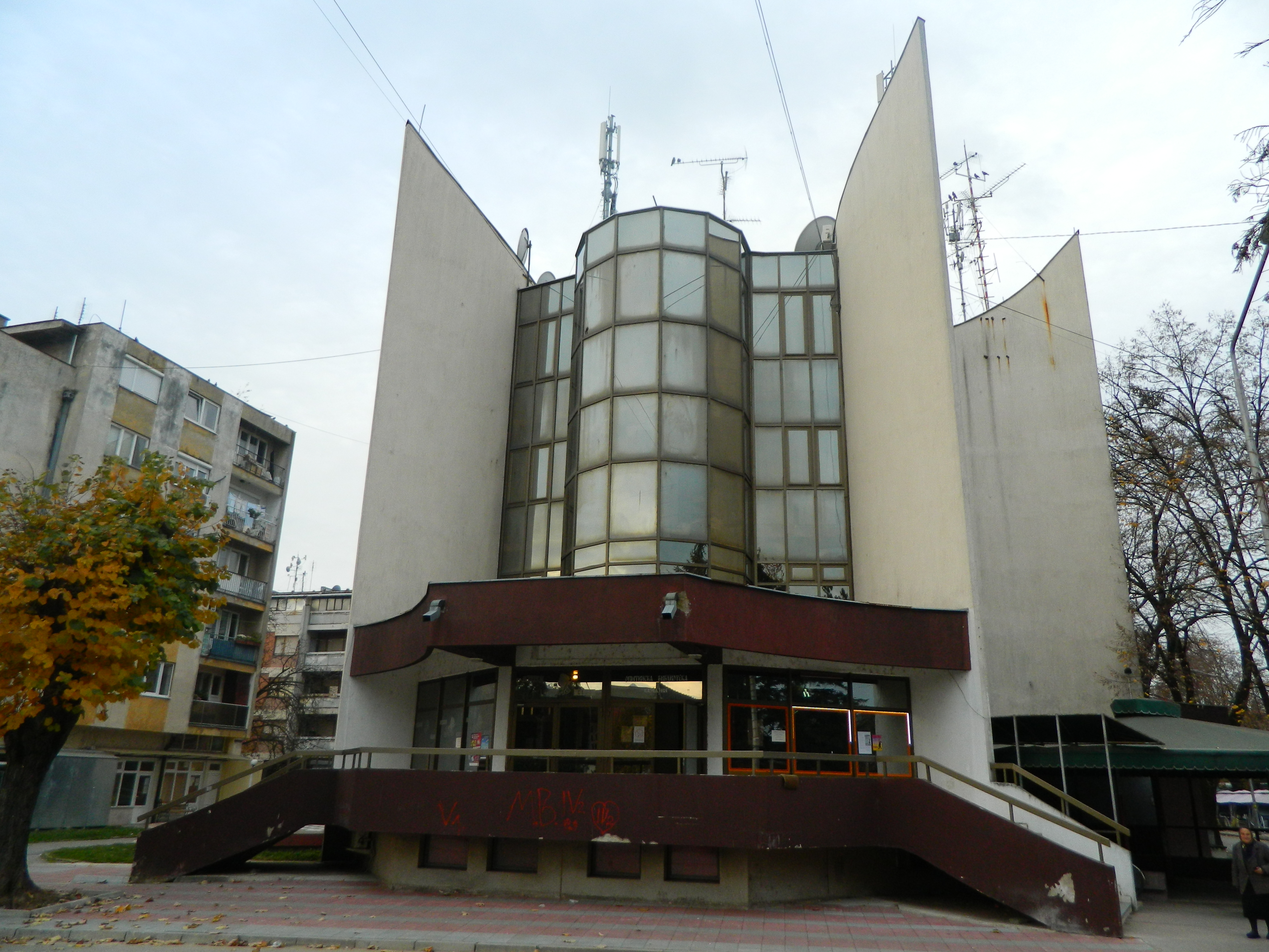 Dom kulture u Varvarinu, ulaz